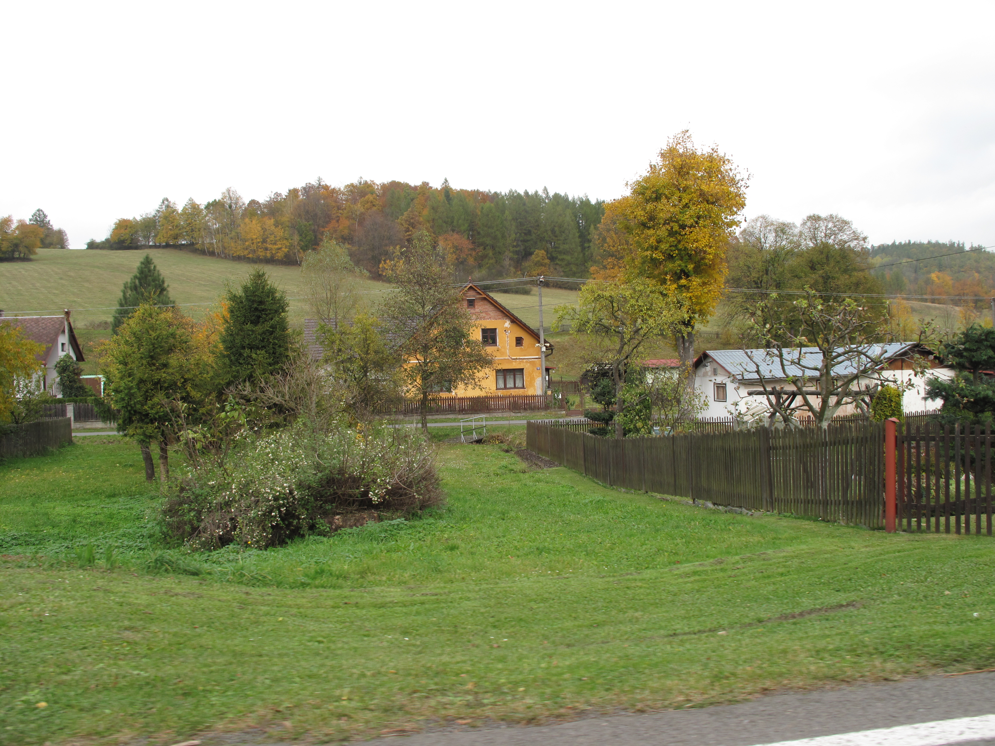 Krasov. Okres Bruntál, Česká republika.